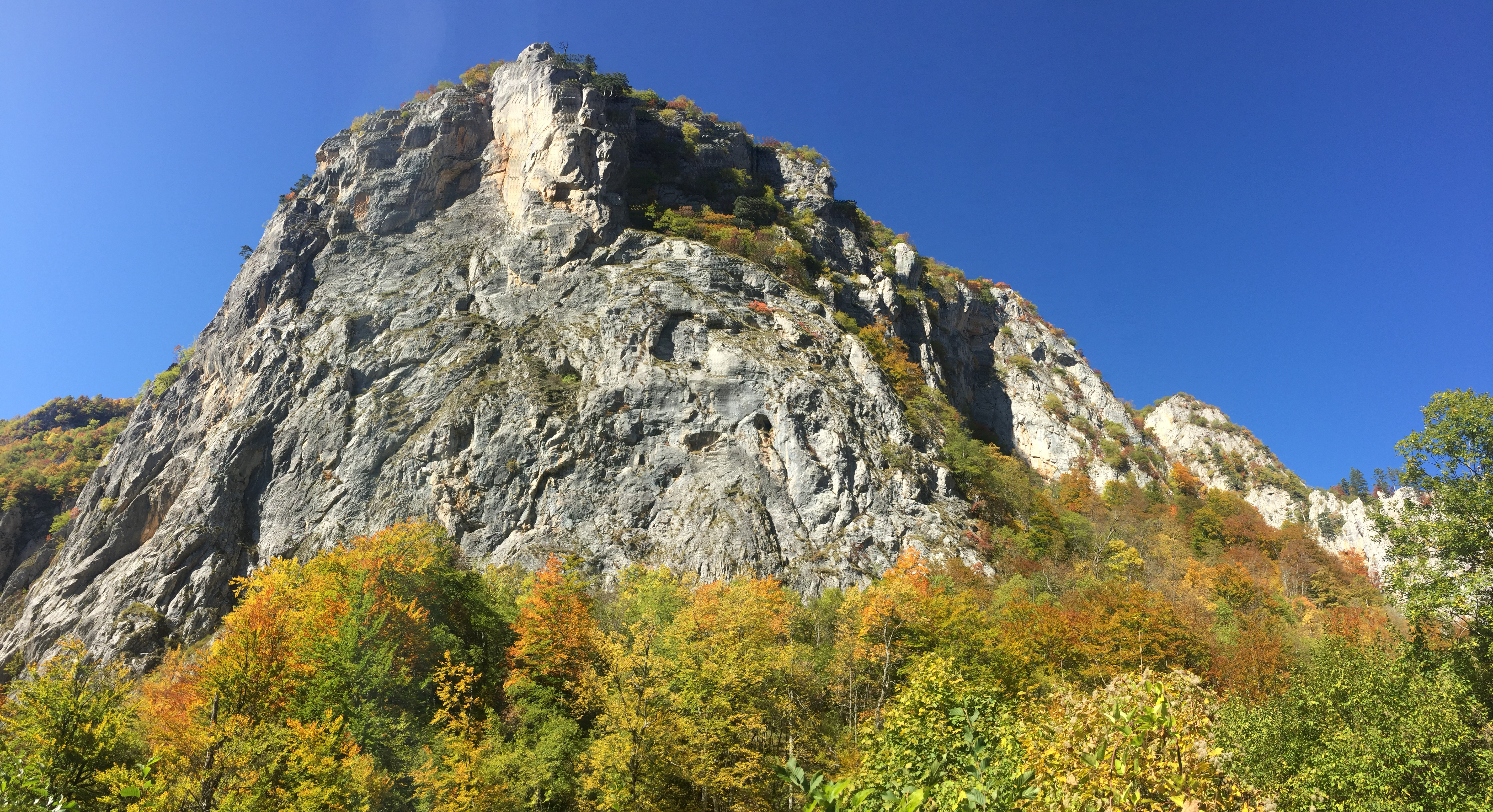 Балканские горы в районе города Фоча. Динарское нагорье